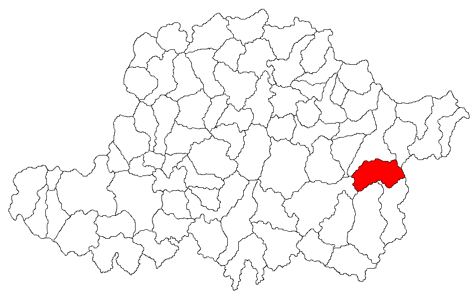 Categorie:Hărţi ale judeţului Arad